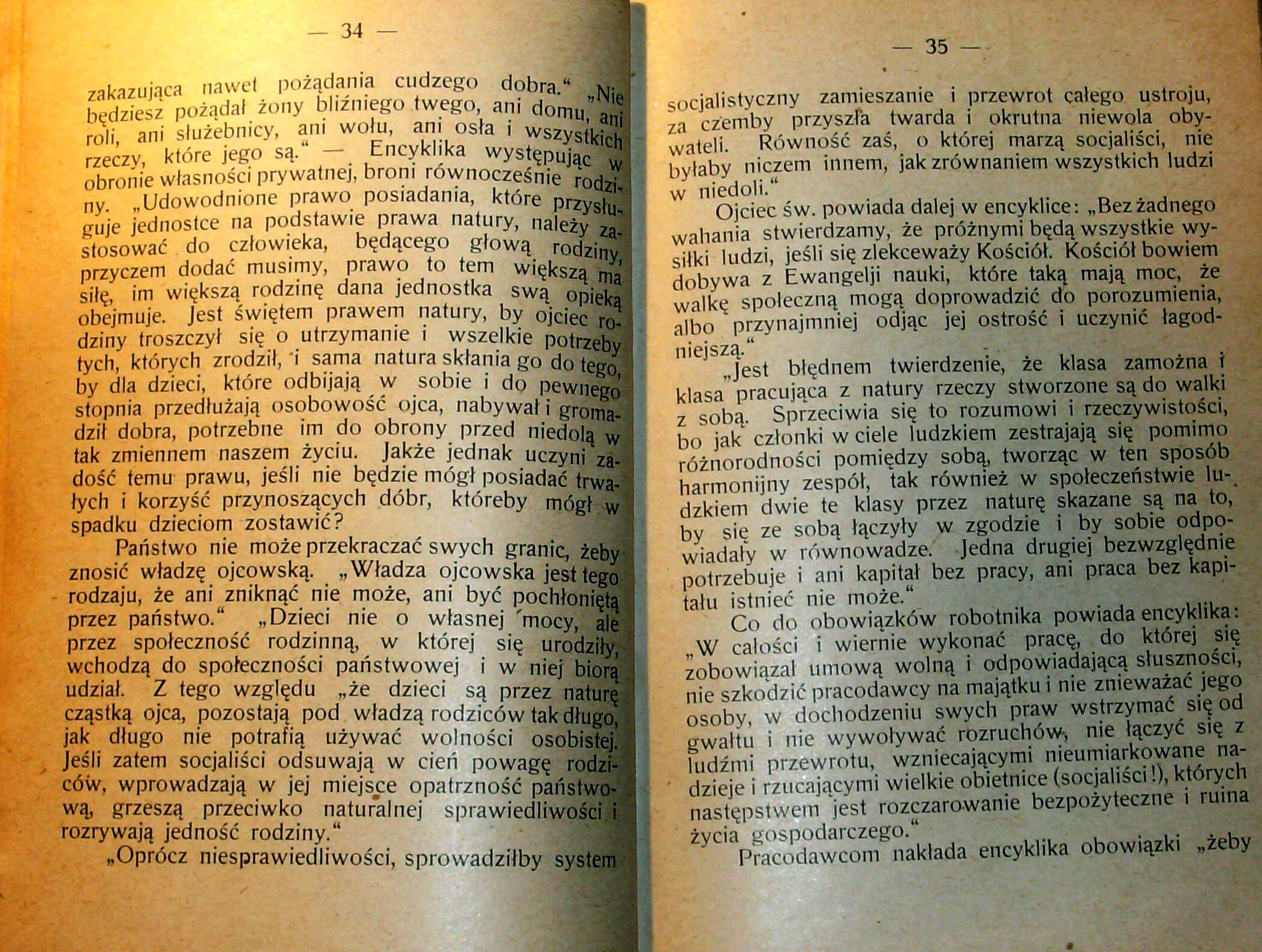 Stanisław Krzyżowski, Rozmyślania w czterdziestą rocznicę encykliki „Rerum novarum”, wydanej 15 maja 1891 r. przez papieża Leona XIII, Pszczyna 1931